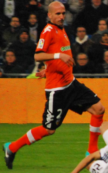 Bruno Saltor, a un R. Madrid - València